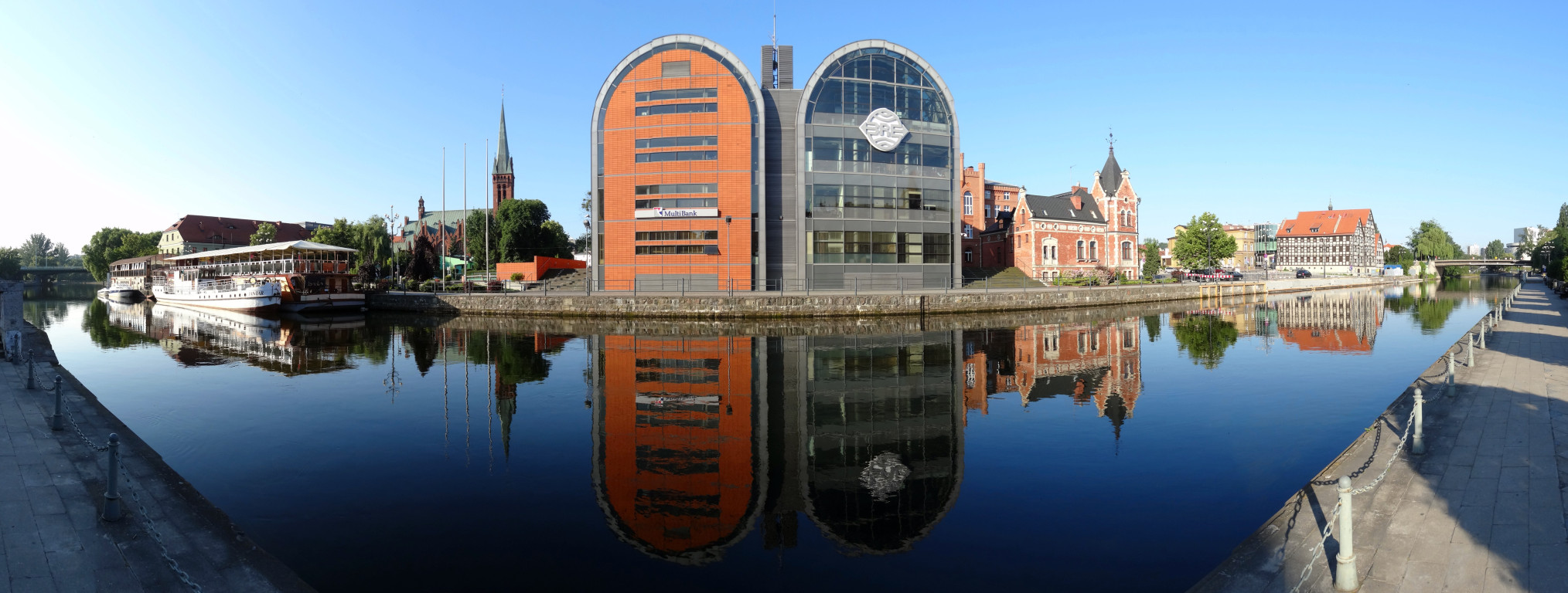 Południowe nabrzeże Brdy w centrum Bydgoszczy